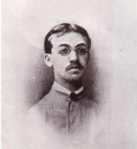 Tagalog: Si Doktor L. L. Zamenhof, imbentor ng wikang Esperanto. 16 taon siya.